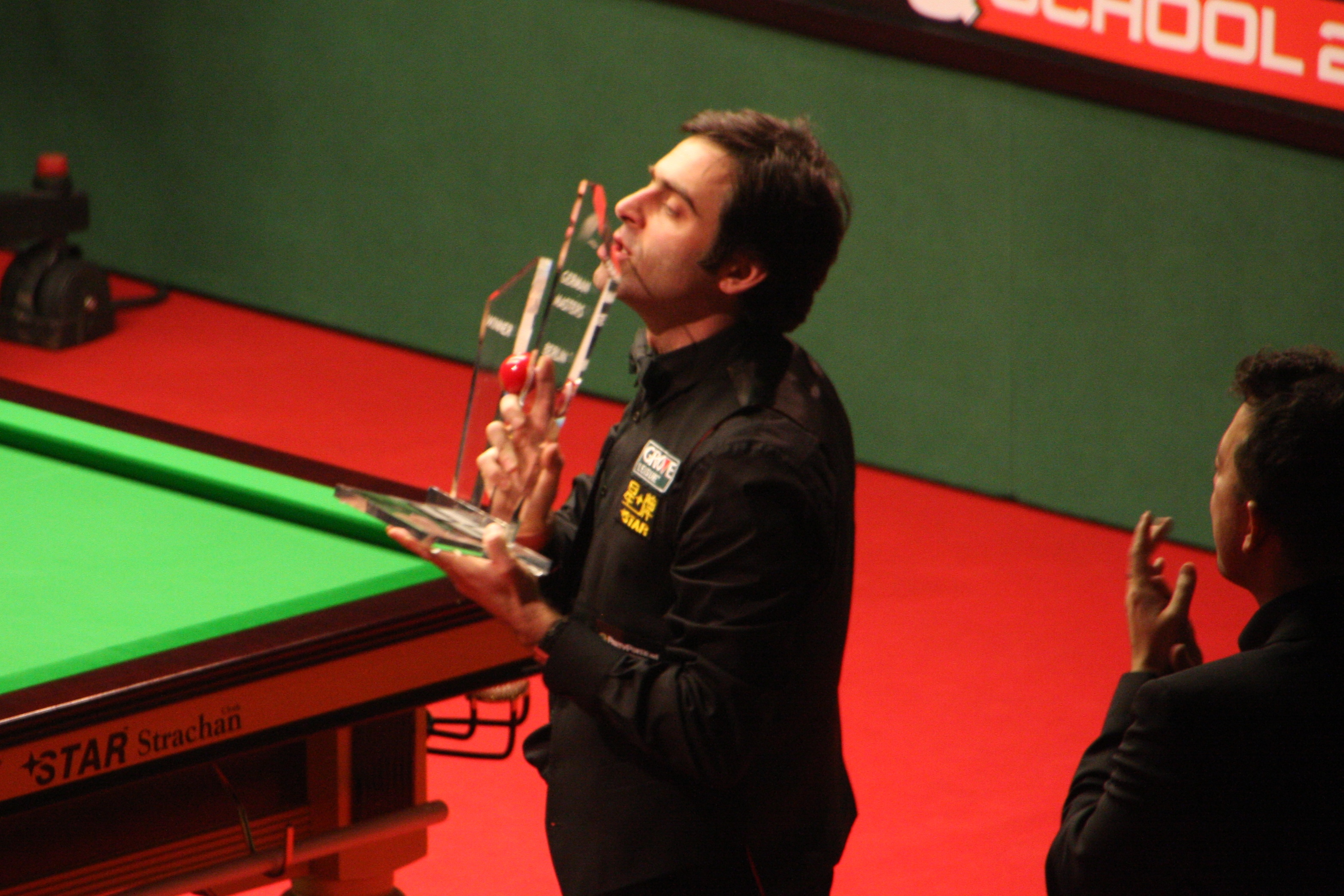 Ronnie O'Sullivan